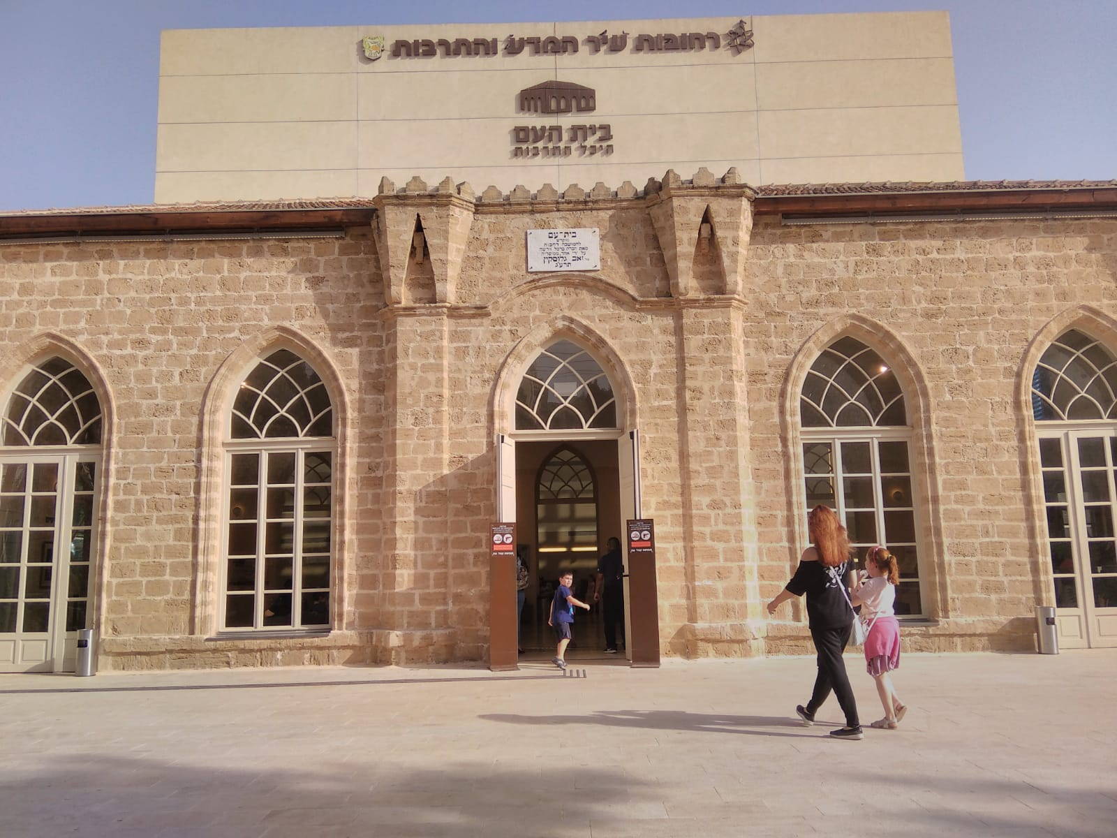 קובץ זה מייצג את בית העם ברחובות בשנת 2019